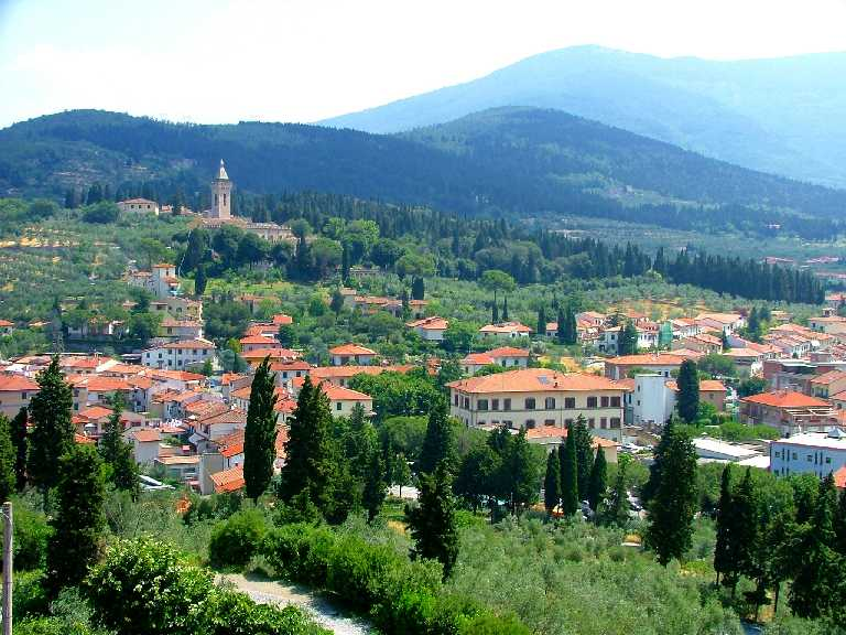 panorama